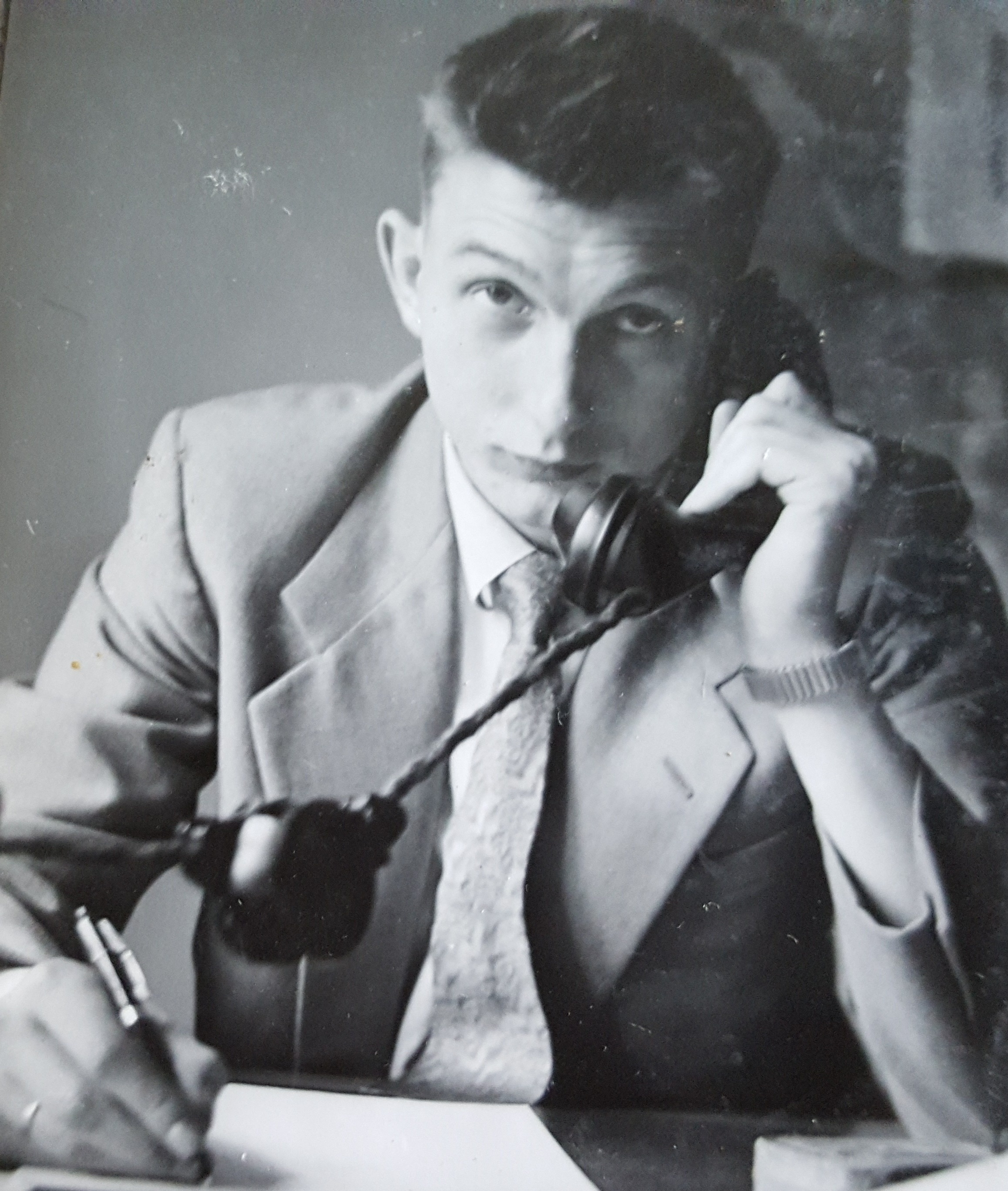 Svein Hauan, kulturjournalist